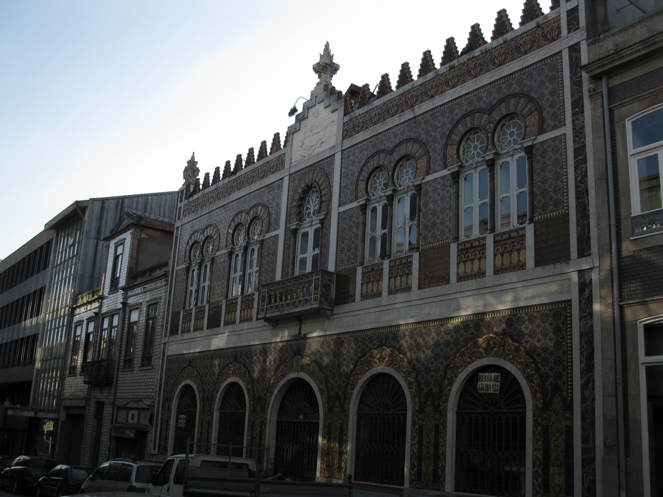 Portugal